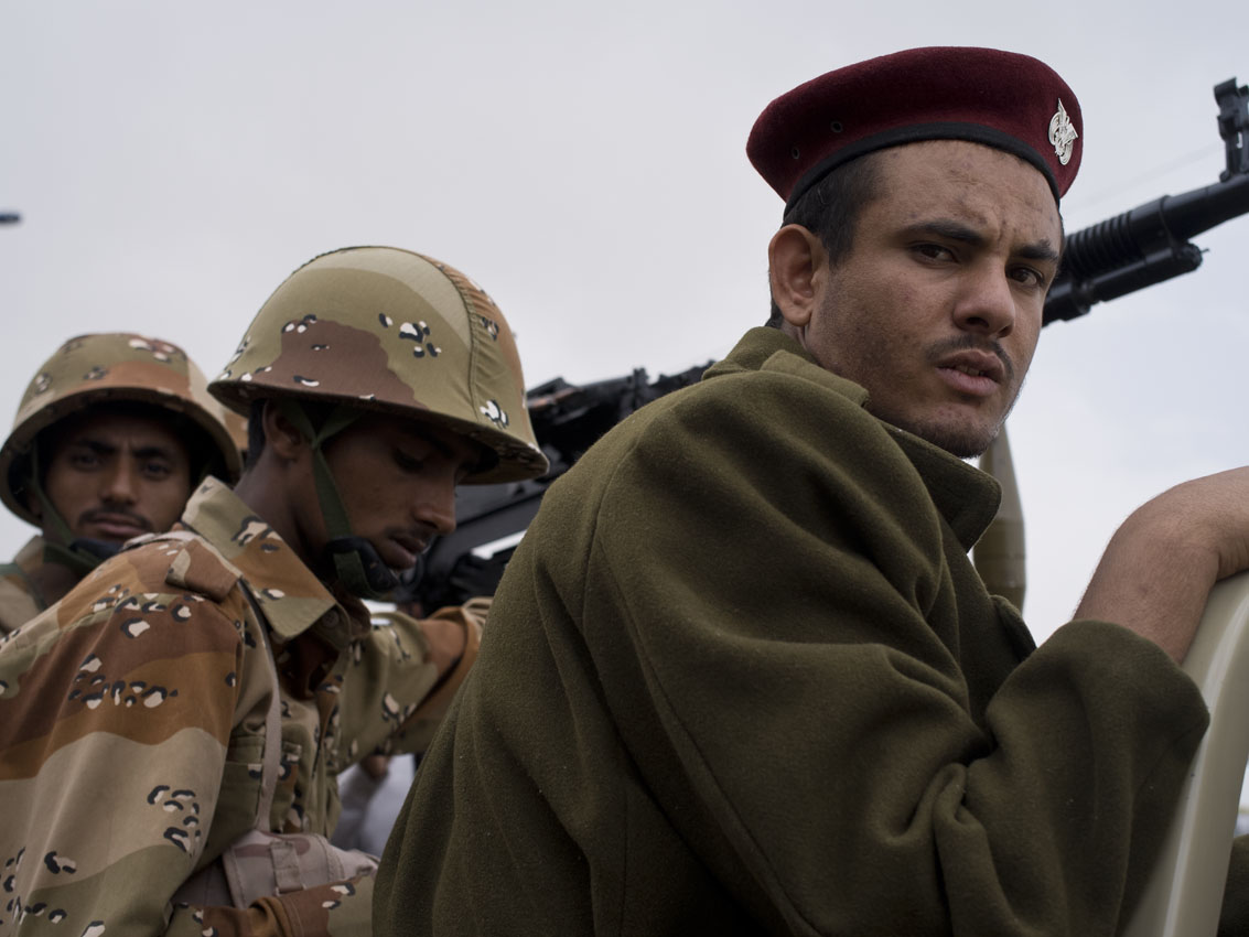 Soldiers